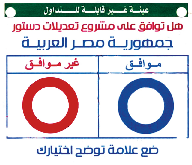 Bulletin de vote utilisé lors du référendum egyptien de 2019